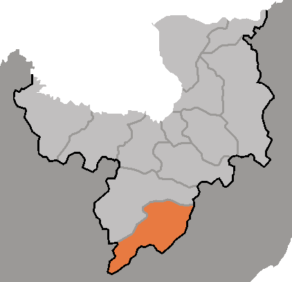 Map of Kimhyonggwon, Ryanggan-do, DPRK, 2006